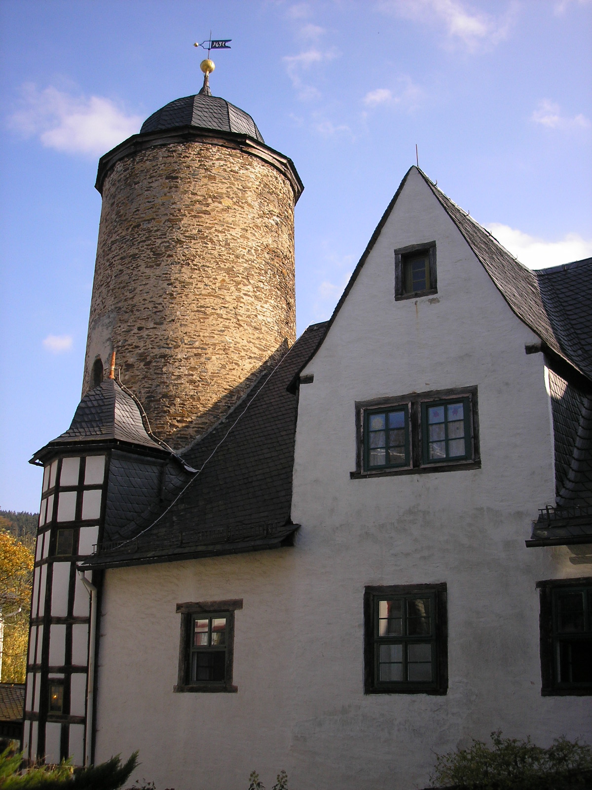 Der Bergfried von Schloss Friedensburg bei Leutenberg (Thüringen).